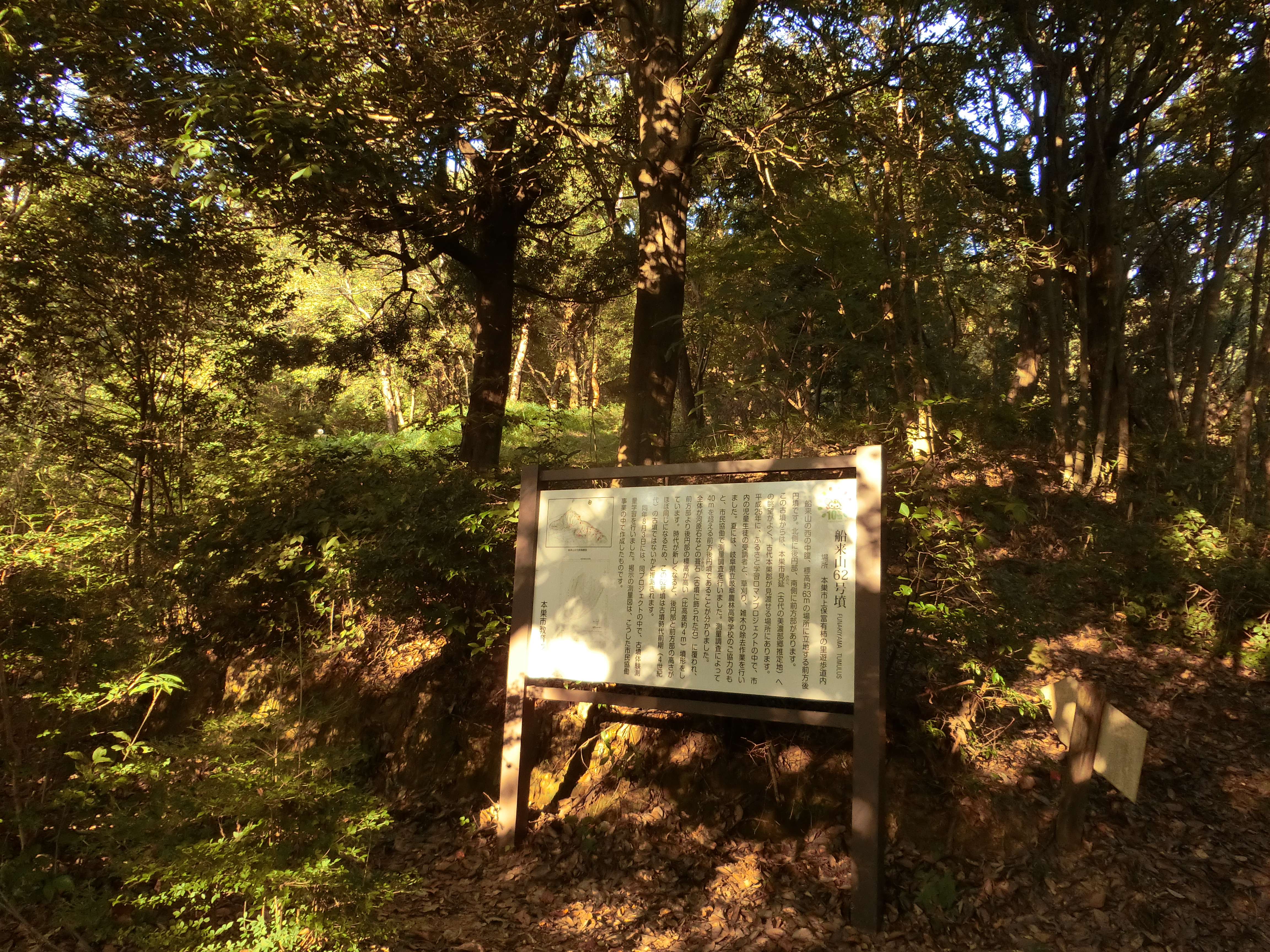 国指定史跡船木山古墳群のうち、第62号墳。前方後円墳に分類される。